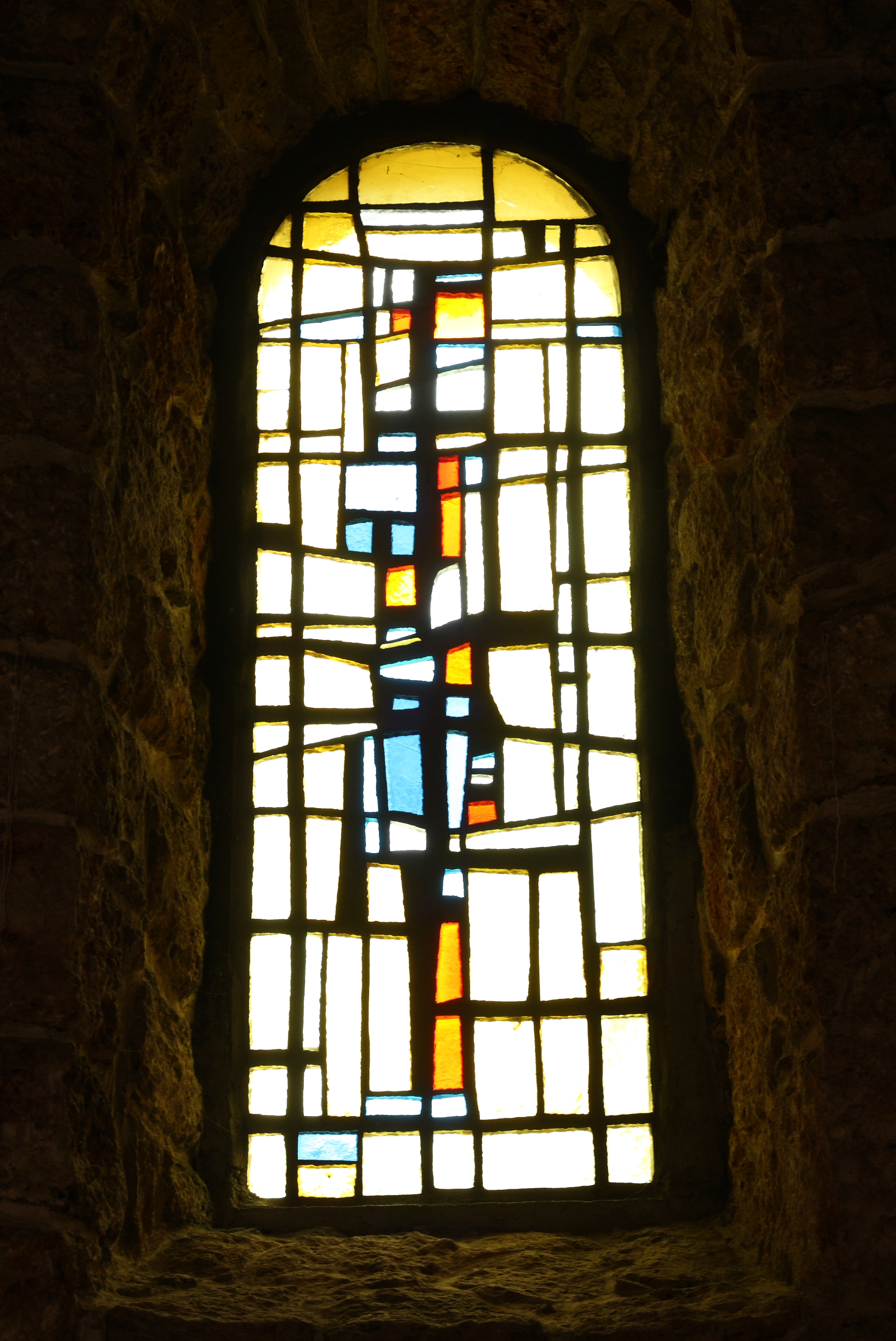 Katholische Pfarrkirche Saint-Matthieu in Bures-sur-Yvette im Département Essonne (Île-de-France), abstraktes Bleiglasfenster